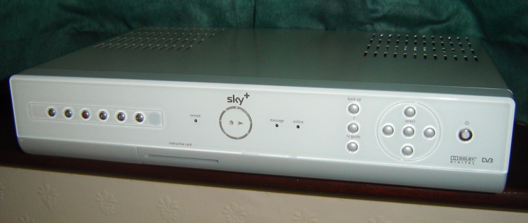 Sky+ digital set-top box